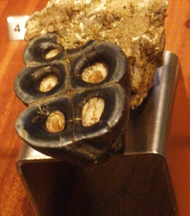 Fossil of Desmostylus, an extinct mammal- Took the photo at Museon museum, Den Haag